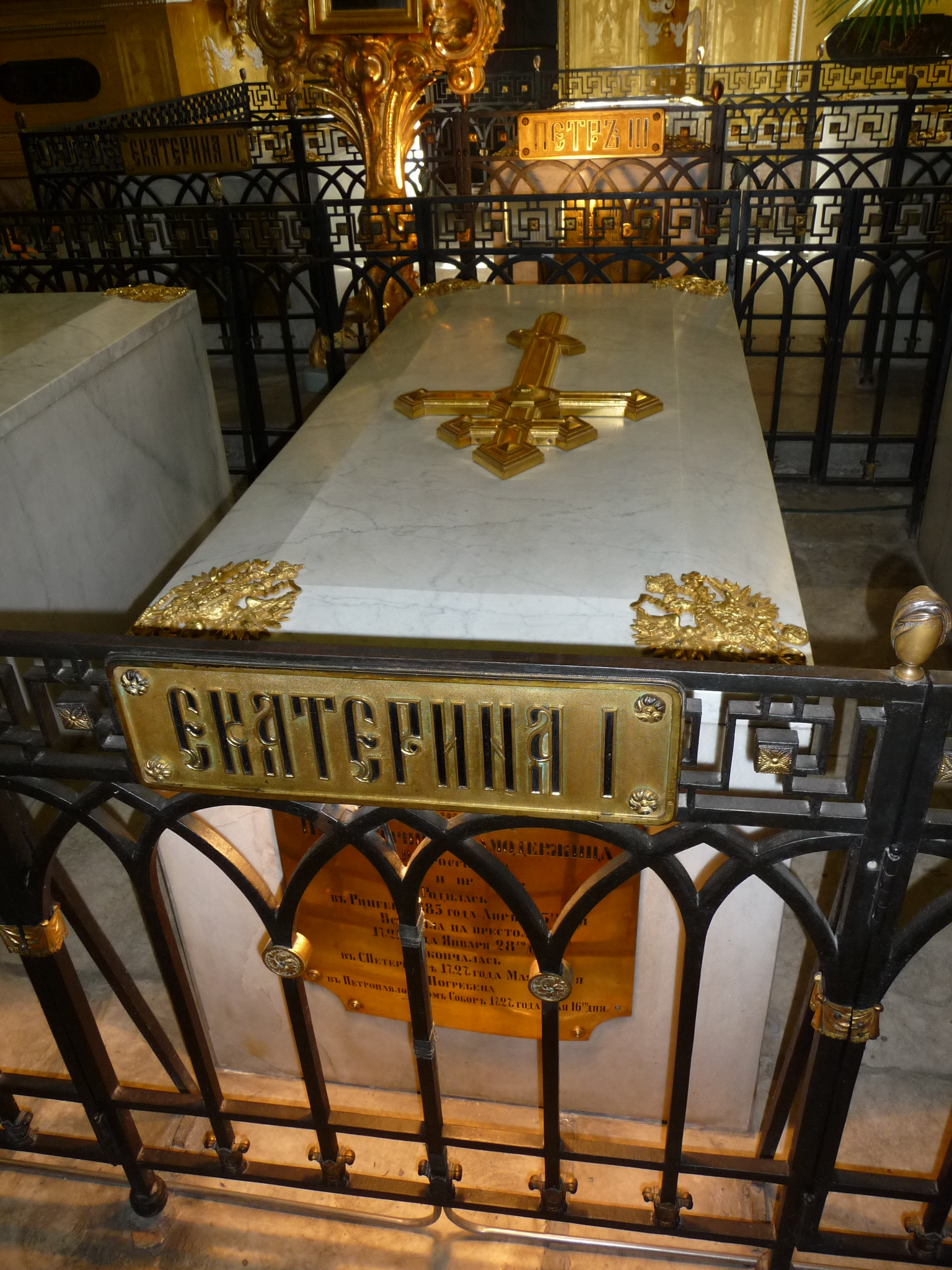 RussianTzarsTumbs-p1030587.jpg